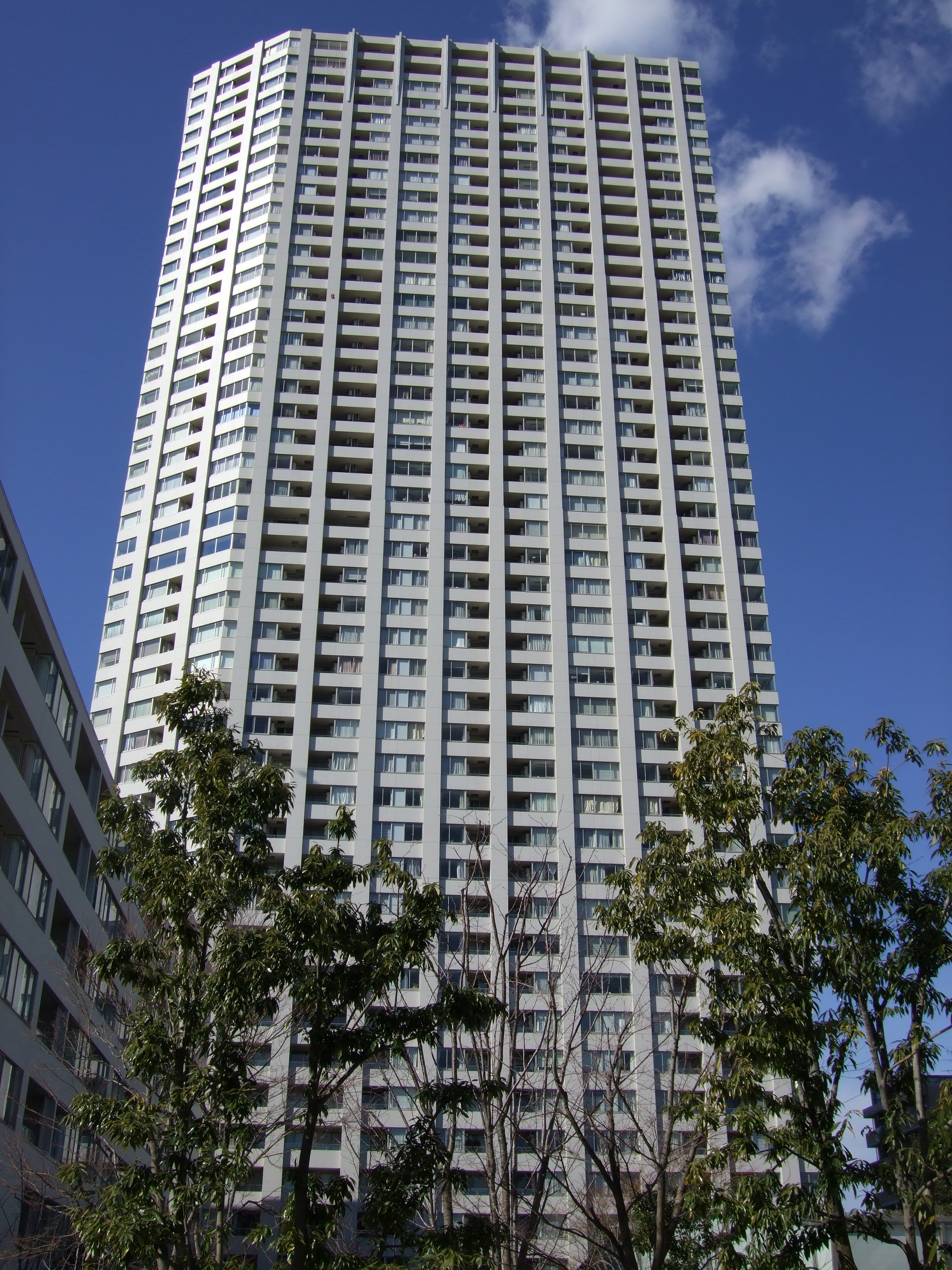 高輪ザ・レジデンス